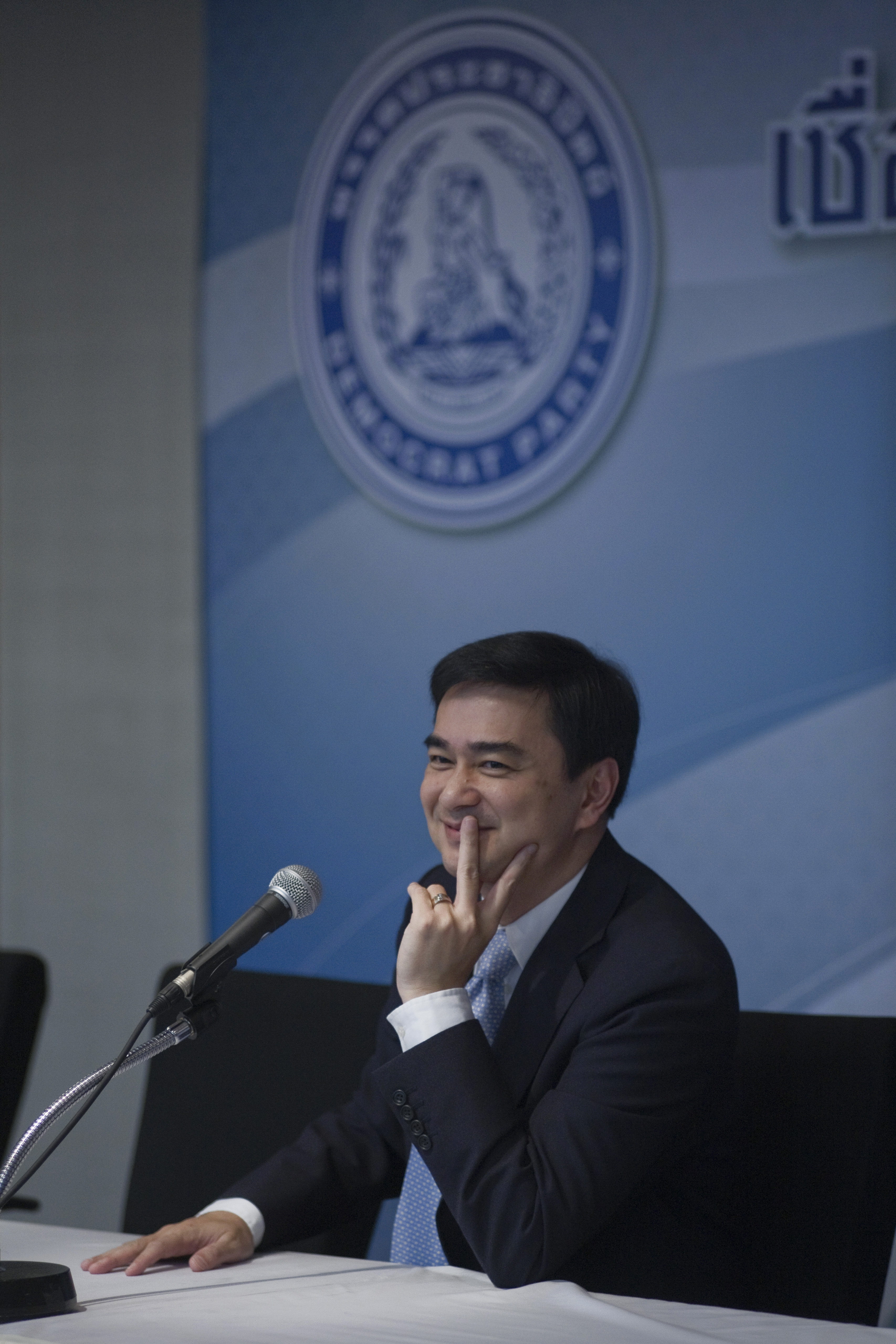 คณะ Young Liberals and Democrats of Asia เข้าเยี่ยมคารวะนายกรัฐมนตรี ณ พรรคประชาธิปัตย์ วันอาทิตย์ ที่ 12 กันยายน พ.ศ.2553 (Photographer attached to the Prime Minister of the Kingdom of Thailand : Peerapat Wimolrungkarat / พีรพัฒน์ วิมลรังครัตน์)